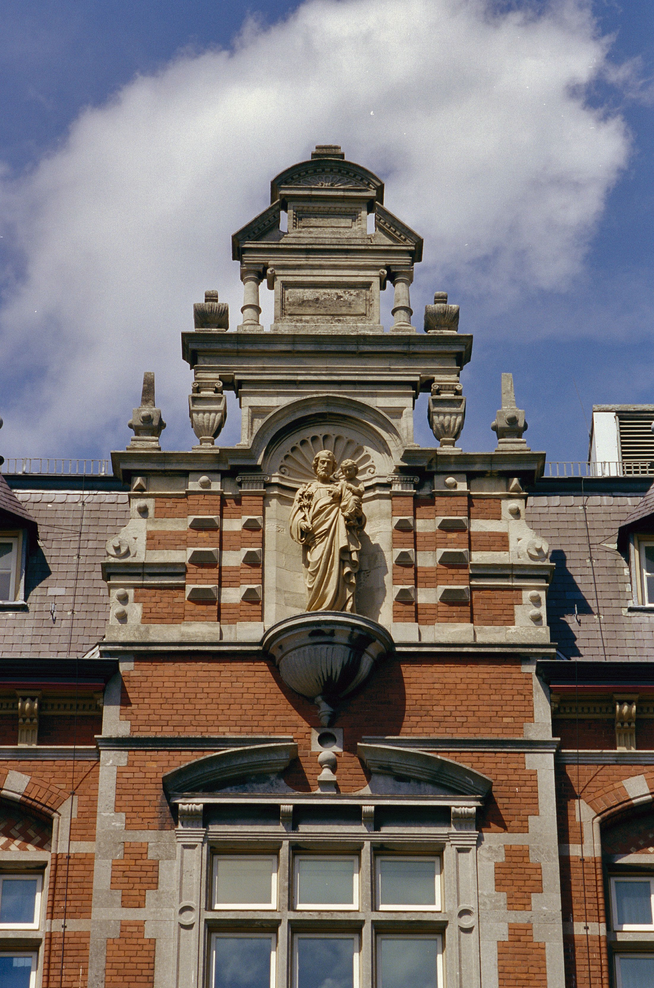 Voormalig Ursulinenklooster: Overzicht van de top van de voorgevel met beeld in nis van het hoofdgebouw van het voormalige klooster, thans gemeentehuis (opmerking: Gefotografeerd voor Kastelen in Limburg (1000-1800), Burchten en landhuizen)